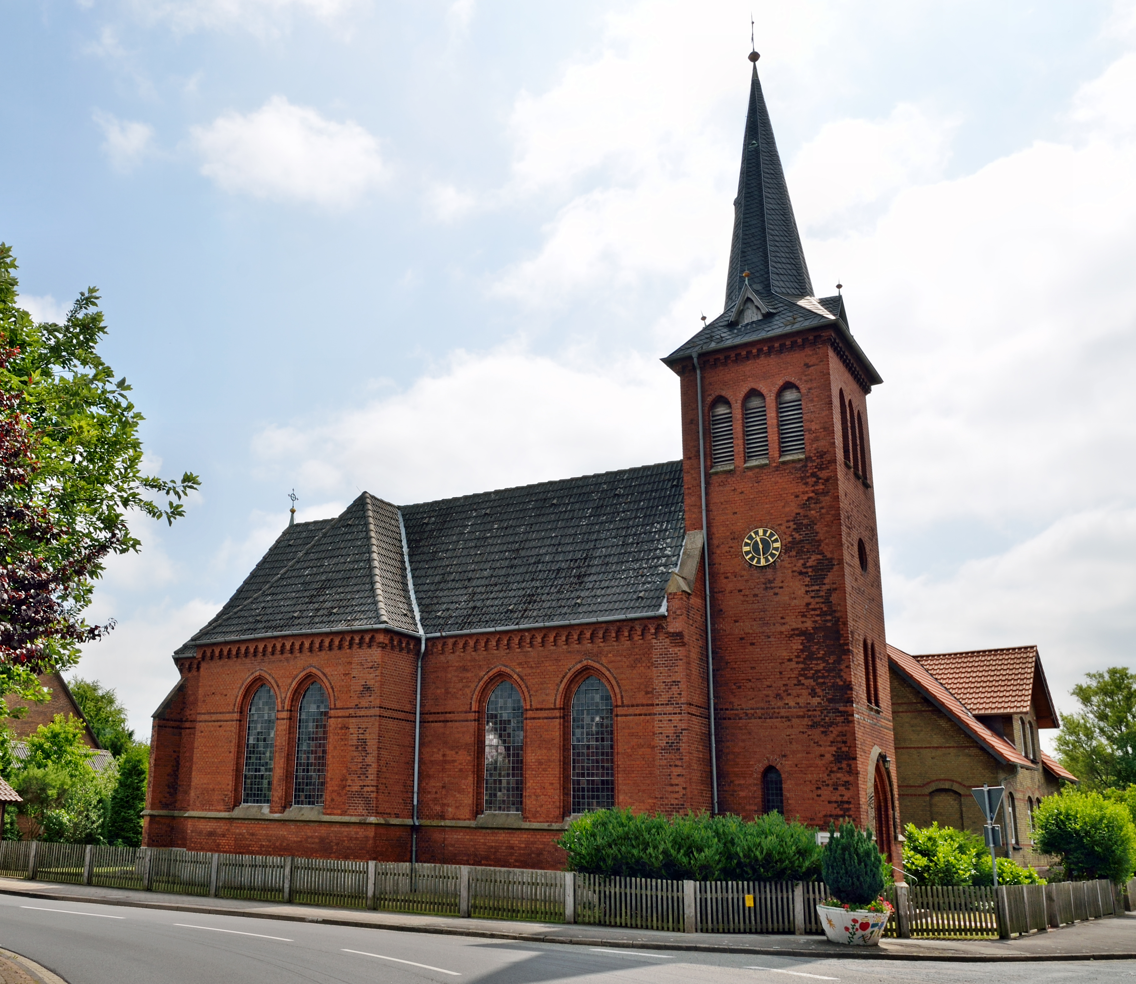 Die St.-Martin-Kirche in Wendeburg-Sophiental, Ecke Holzmark/Fürstenauer Weg; ev., eingeweiht 1890